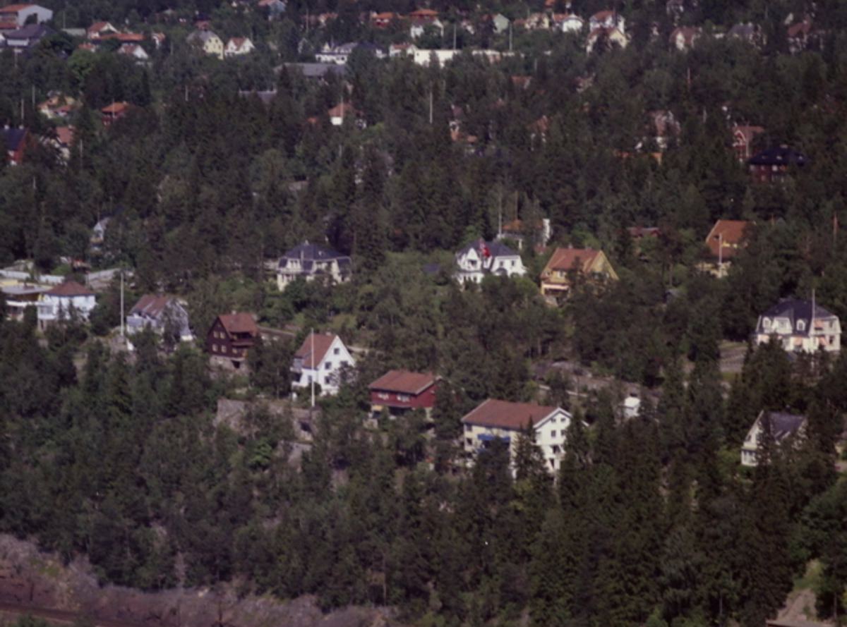 Villaområde, Bekkelagsterrassen, Oslo 1962